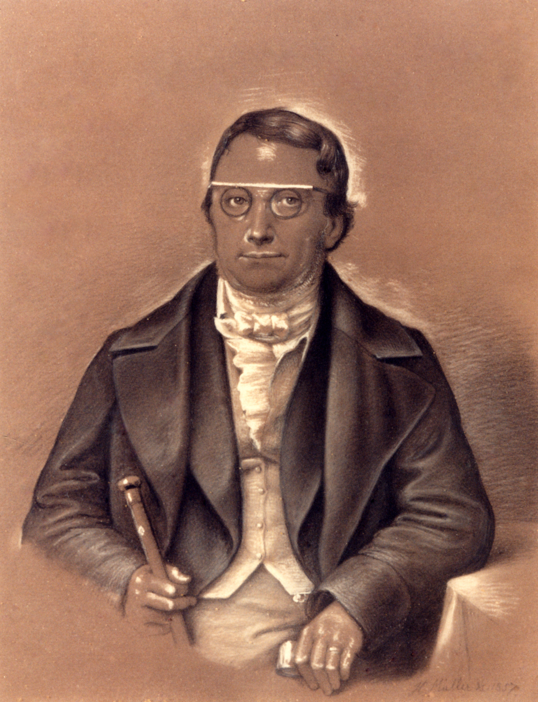 Reproduktion eines Pastells, darstellend den Oberkonsistorialdirektor und Kanzler des Großherzogtums Sachsen-Weimar-Eisenach Gustav Leopold Constantin Wittich (1783-1857)